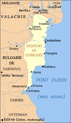 Despotat de Dobroudja, d'après User:Anonimu rectifié d'après Florin Constantiniu et Utilisateur:Alex:Dan.